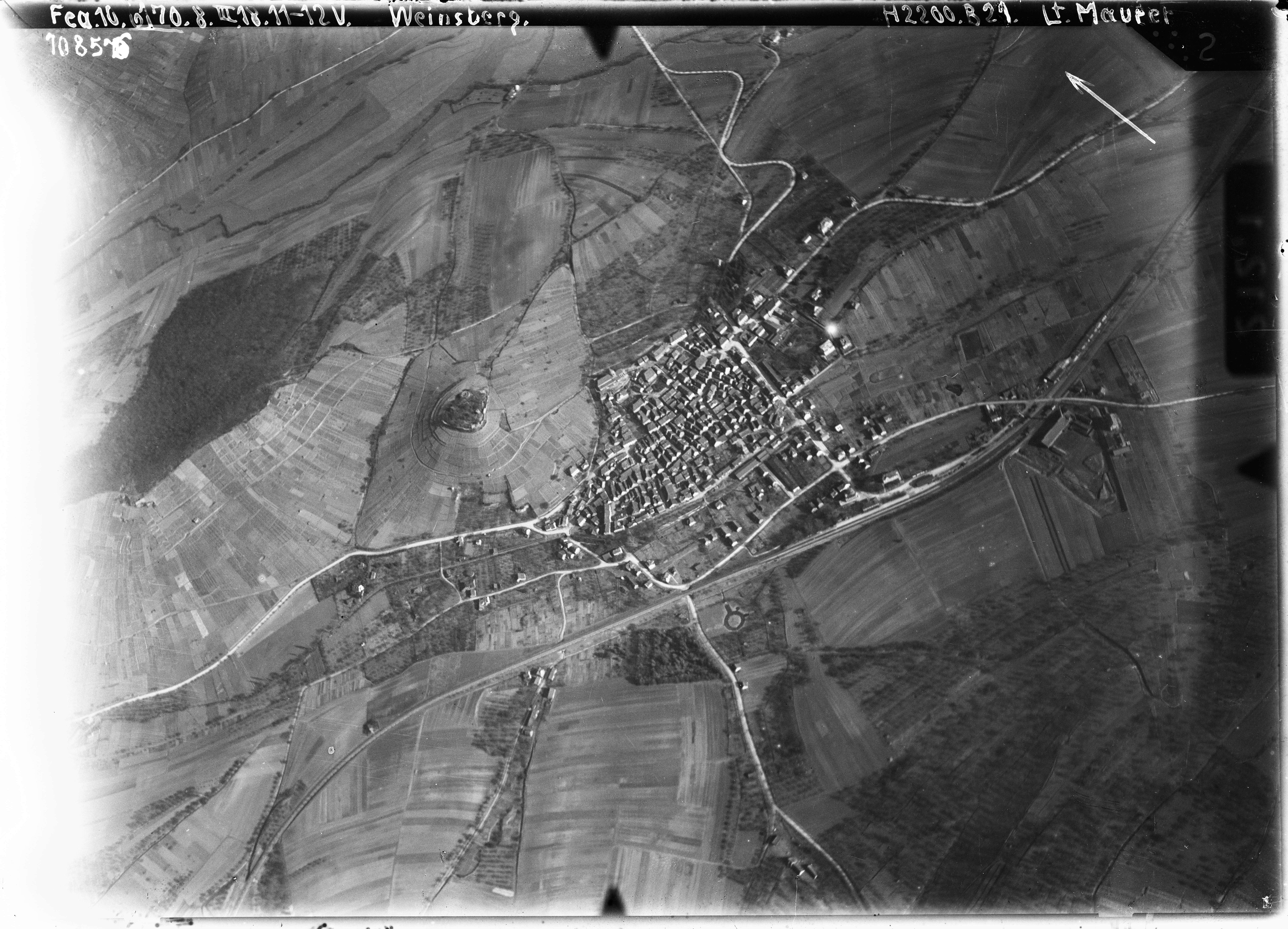 Luftbild der Stadt Weinsberg im Jahr 1918, vermutlich zu militärischen Zwecken aufgenommen